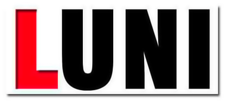 LUNI - Laisvasis universitetas